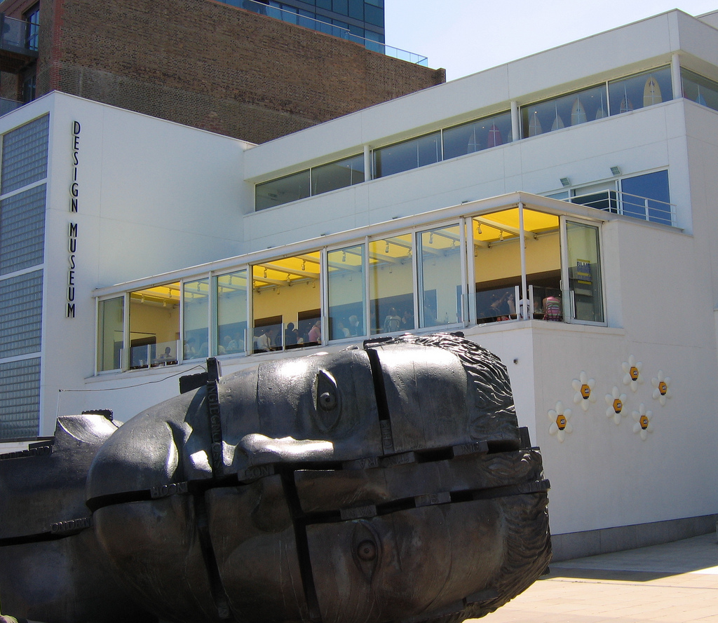 Design Museum London